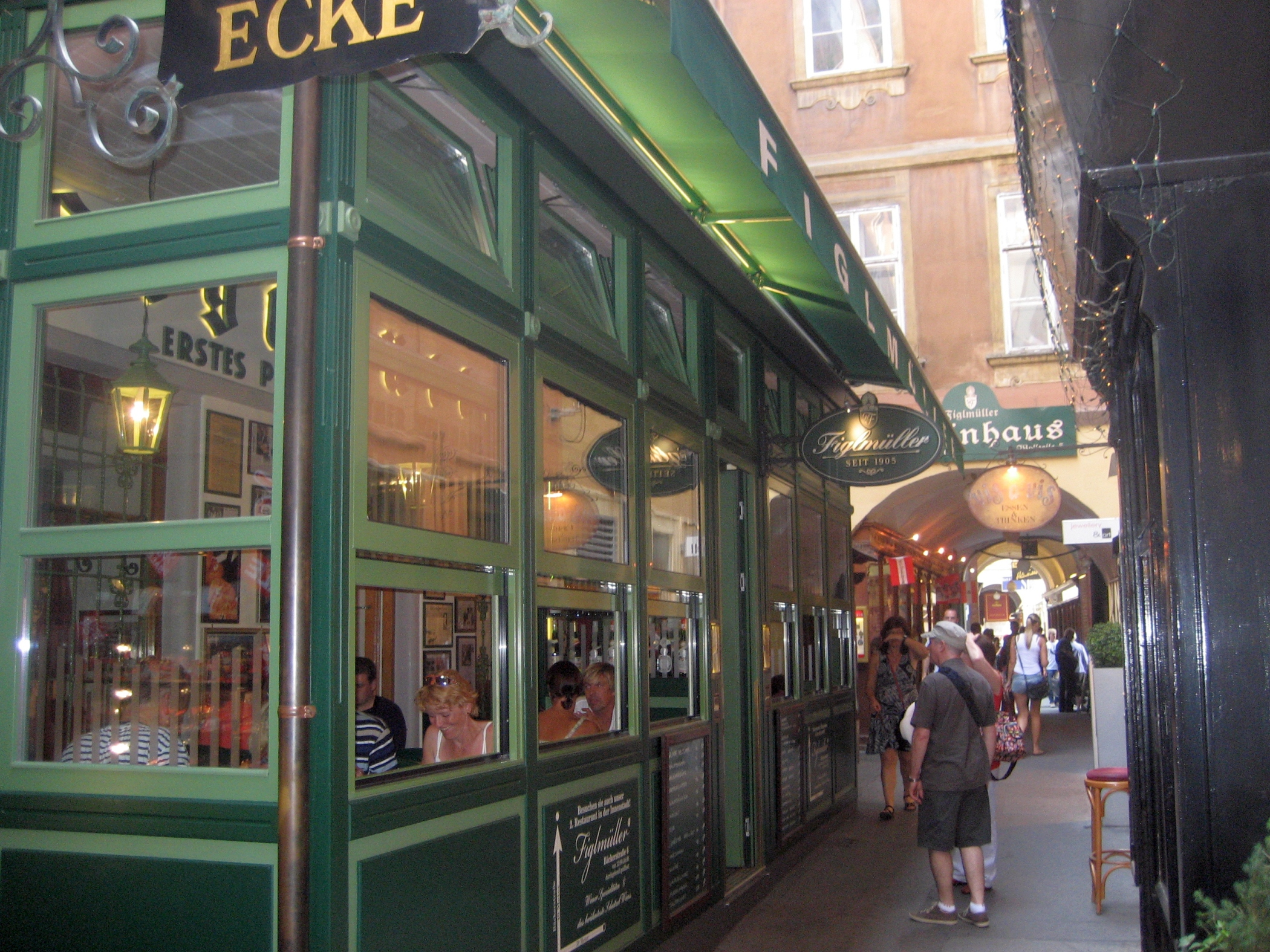 das Restaurant Figlmüller im Haus Wollzeile 5 im 1. Bezirk, in Wien